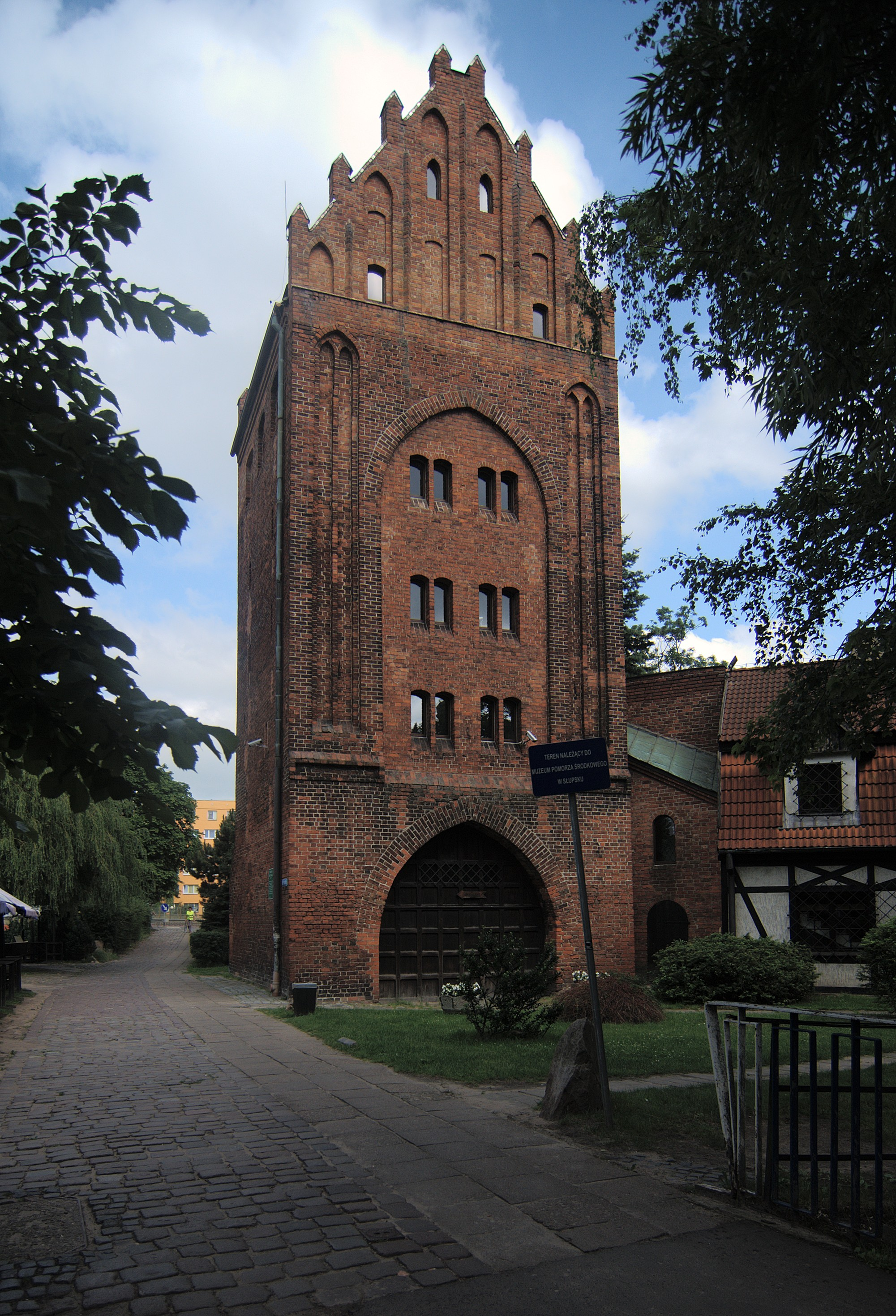 Słupsk. Brama Młyńska.